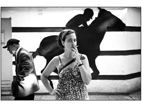 Daniela Pasik